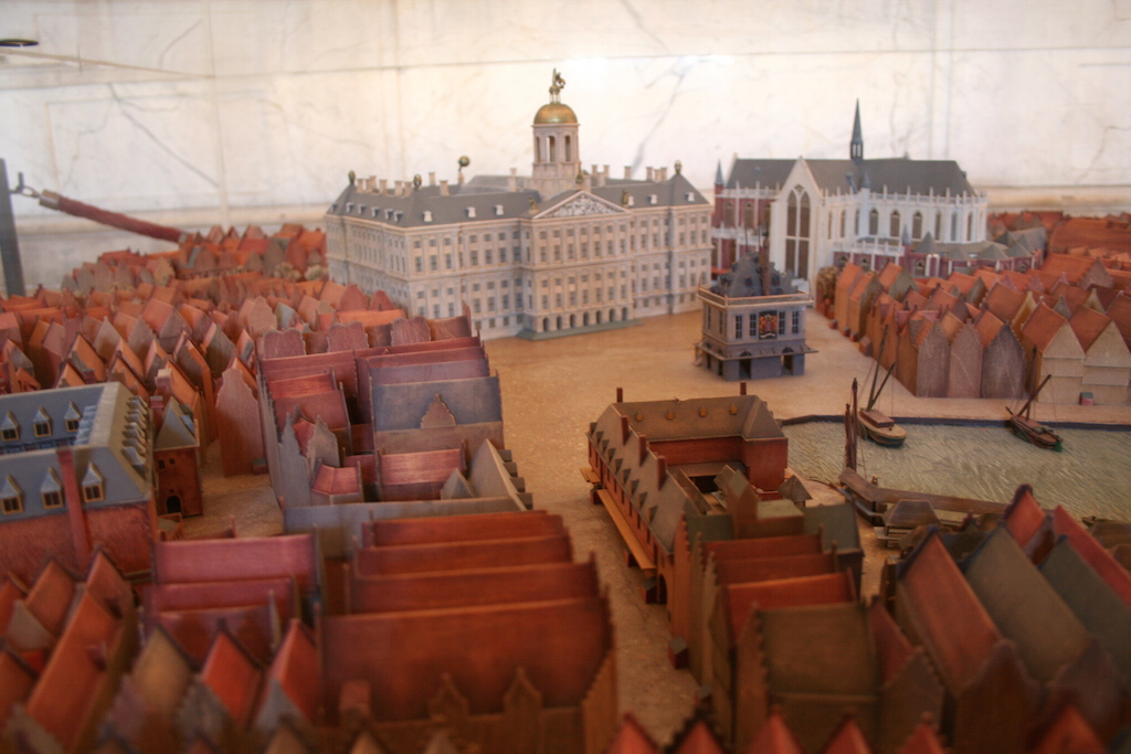 Maquette Dam, Vismarkt. Geëxposeerd in het Paleis op de Dam; 2005. Foto: Erik Swierstra.